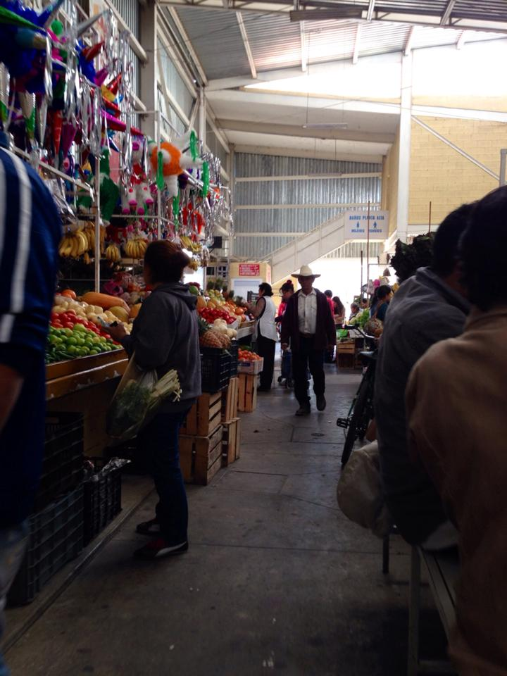 El comercio de diversos productos comestibles y de primera necesidad se realiza en los alrededores del Mercado Municipal de Uriangato "José Dionisio Vallejo"